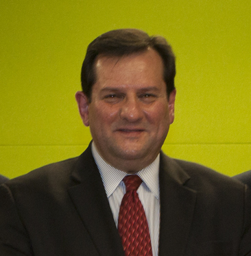 Foto: Cancillería. Representantes de América Latina y el Caribe se reunieron con el embajador ecuatoriano Diego Morejón,presidente del comité de descolonización de las Naciones Unidas, en Nueva York, para hablar sobre la cuestión Malvinas